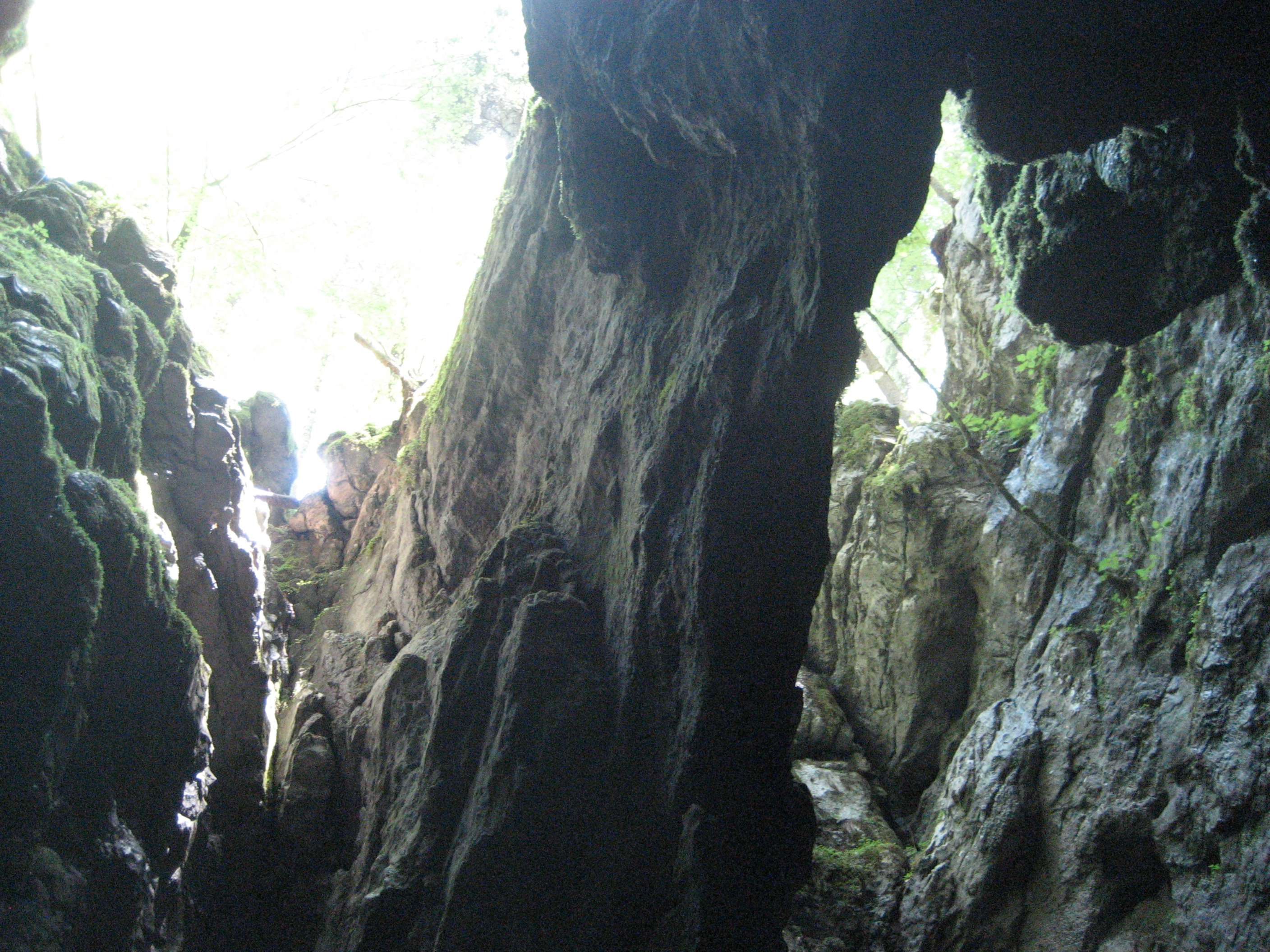 Pogled iz jednog od otvora spilje ledare